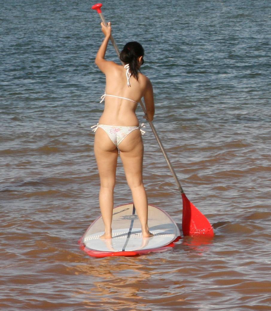 Regata Barcos a Vela